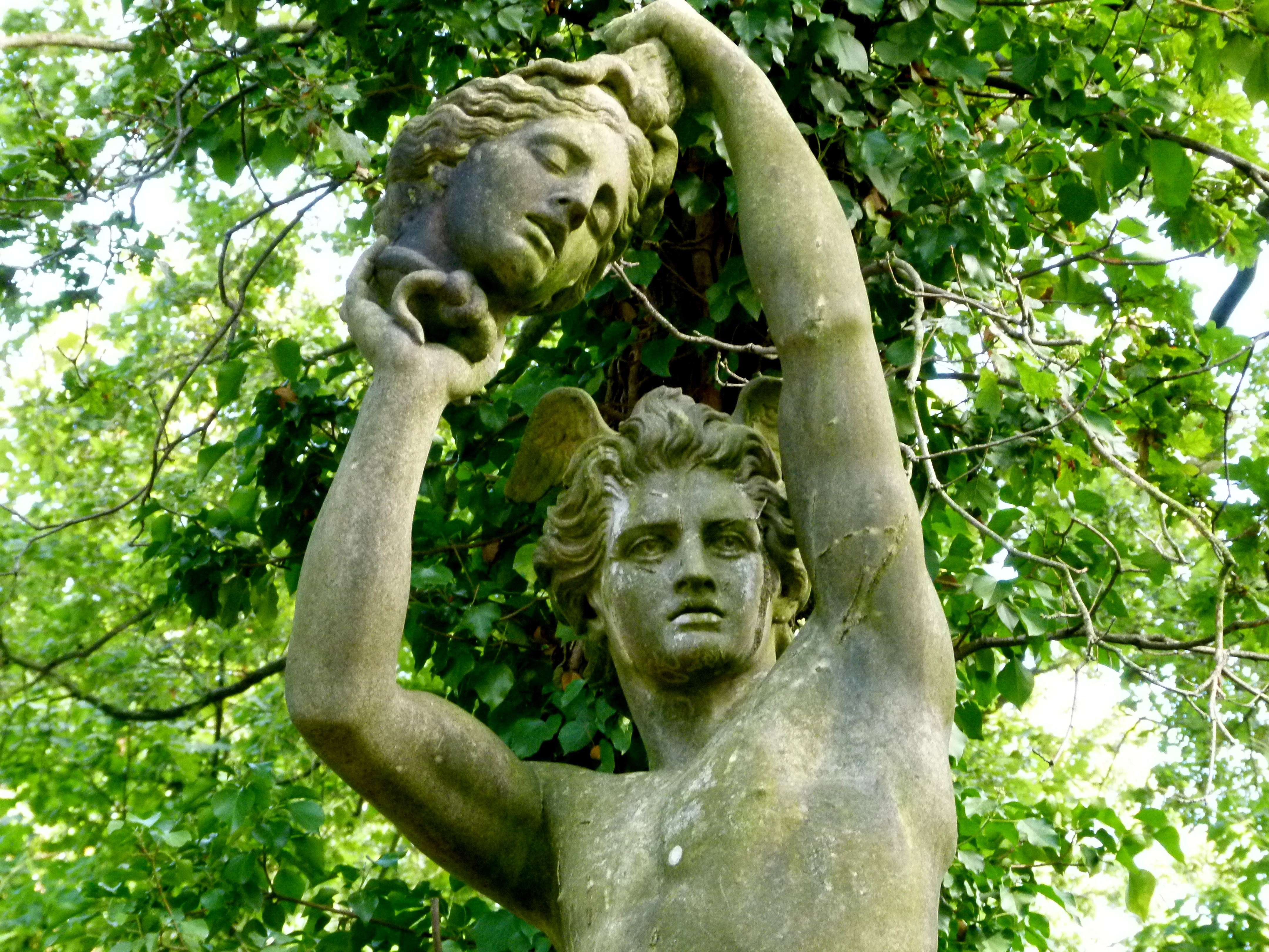 Sculpture au Jardin d'Agronomie Tropicale - Persée tenant la tête de Méduse